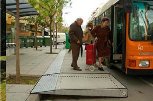 Mobiliario urbano gitma acera modular